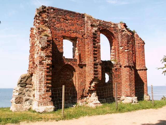 Church ruins in Trzęsacz